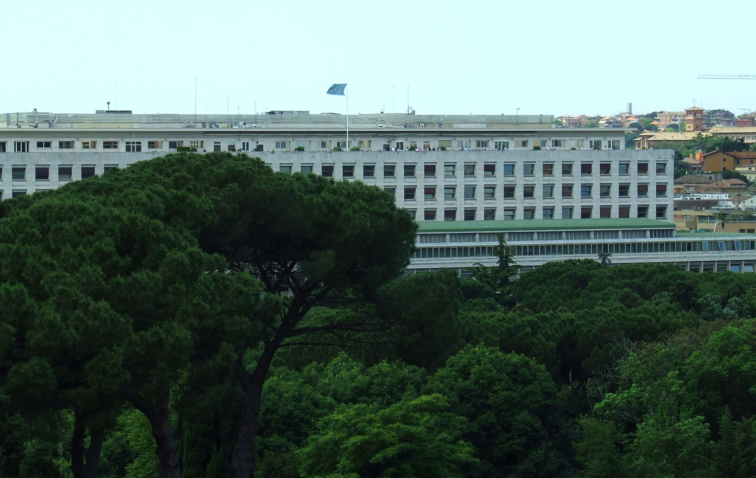 Sede della FAO, Organizzazione per l'Alimentazione e l'Agricoltura delle Nazioni Unite, a Roma, in Viale delle Terme di Caracalla.